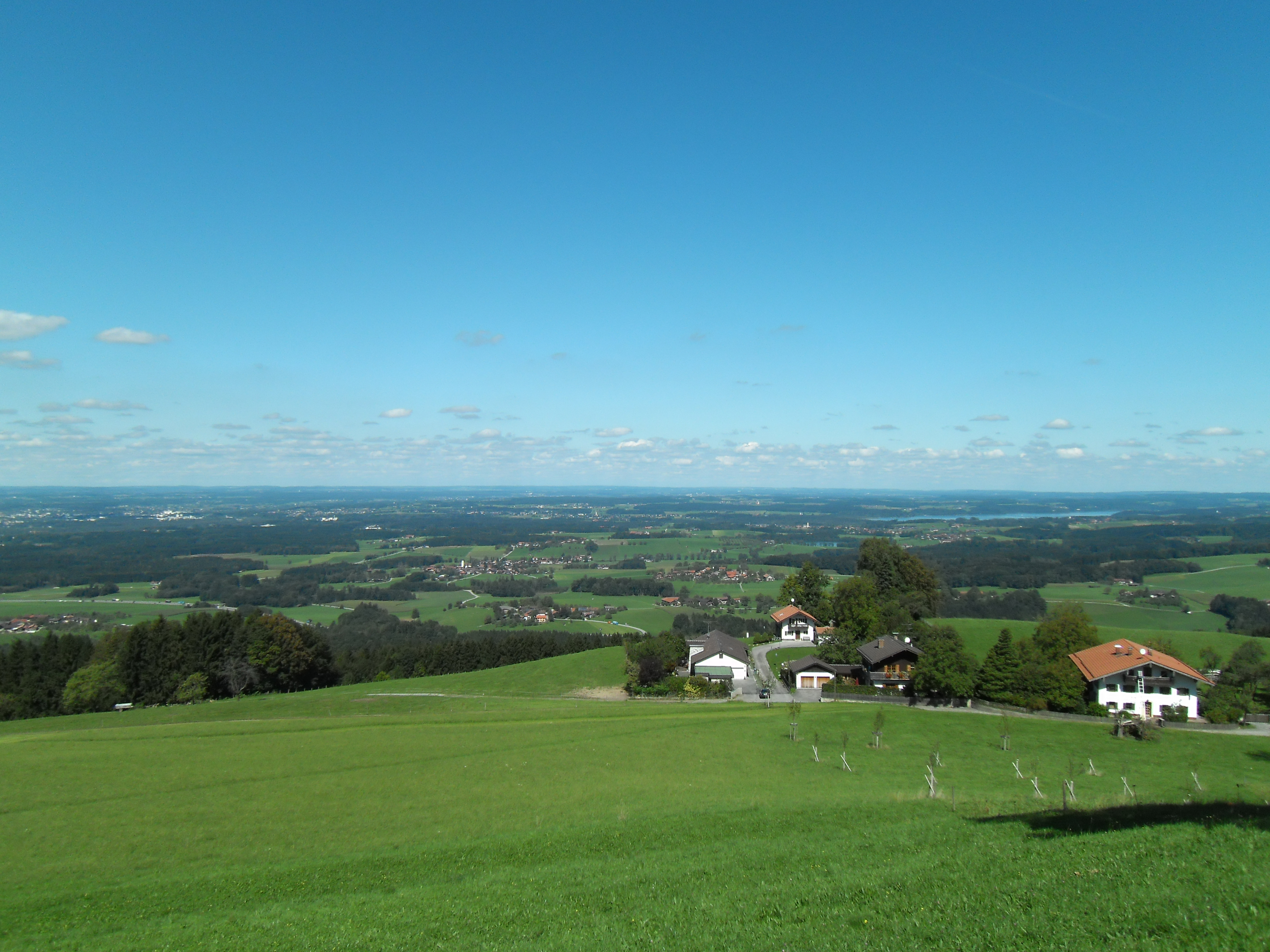 Gemeinde Samerberg (Obb.), Blick von der Aussichtskapelle im Gemeindeteil Obereck auf den Gemeindeteil Untereck, im Hintergrund rechts von der Bildmitte der Simssee